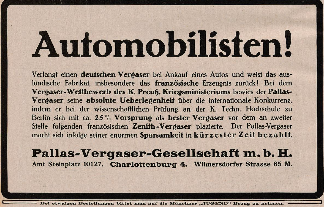 Werbeanzeige für Pallas-Vergaser aus (Berlin-)Charlottenburg, 1914